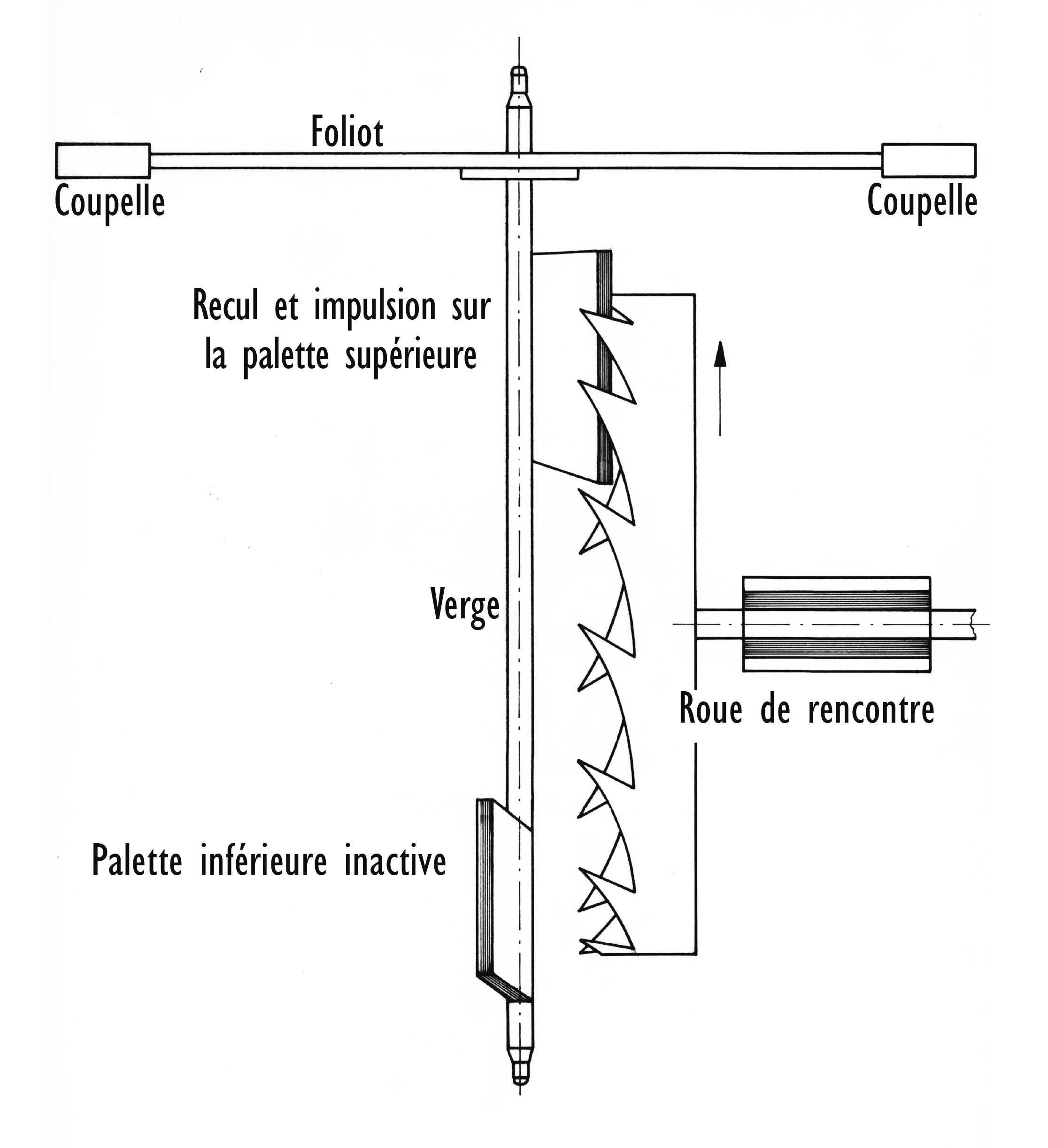 Échappement à roue de rencontre (schéma)